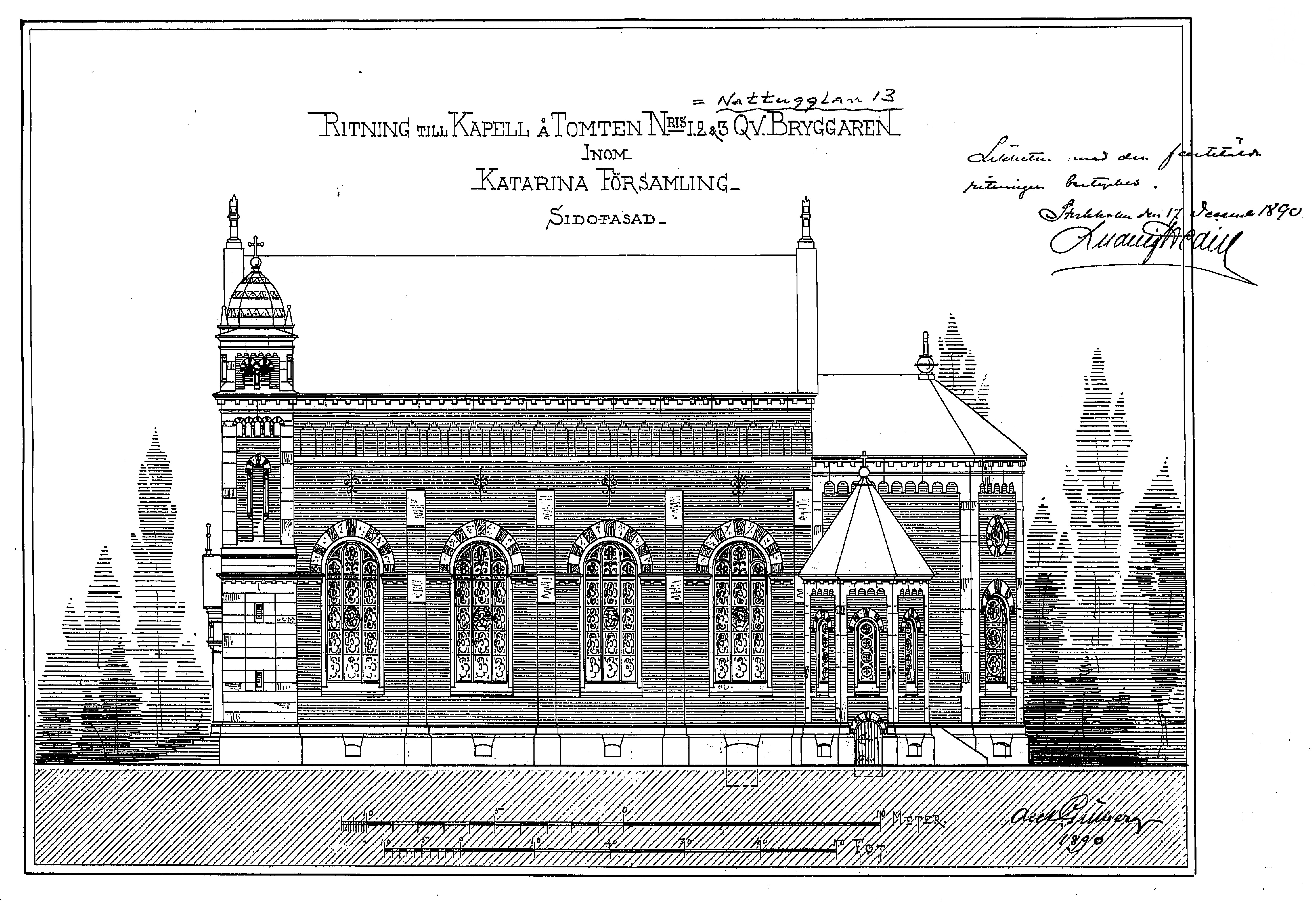 Sankt Eriks katolska domkyrka, fasad mot väst